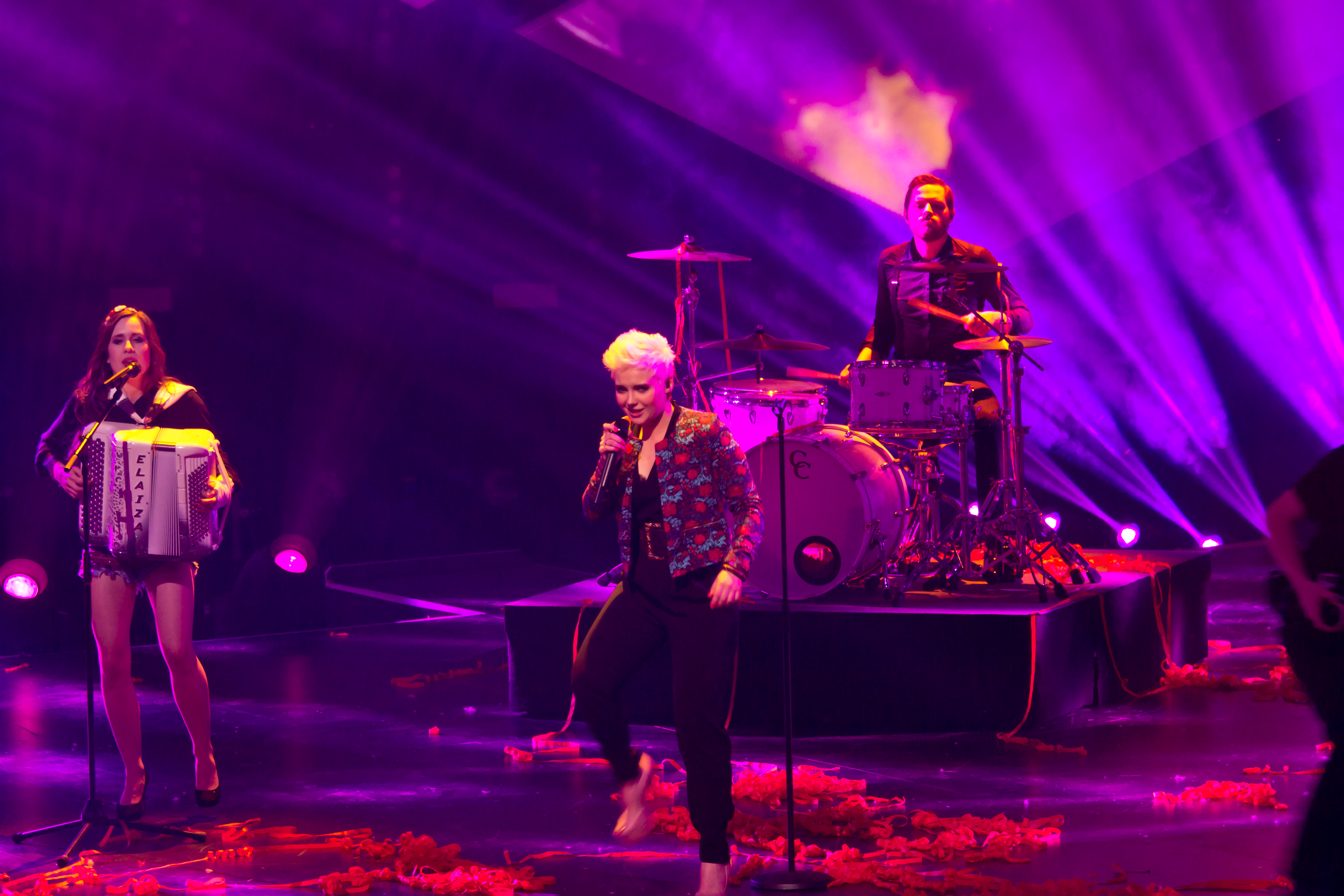 Unser Song für Dänemark - LivesendungFoto: Auftritt von Elaiza